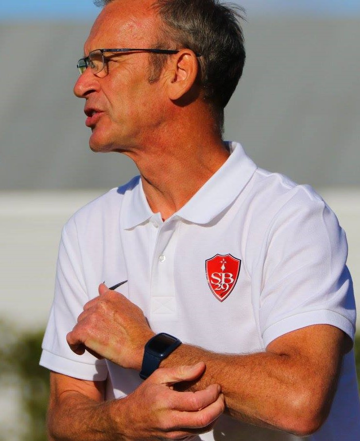 Jean-Marc Furlan: juillet 2016: Nouvel Entraineur de Stade Brestois